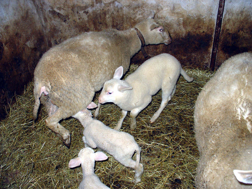 junge Lämmer beim säugen im Stall